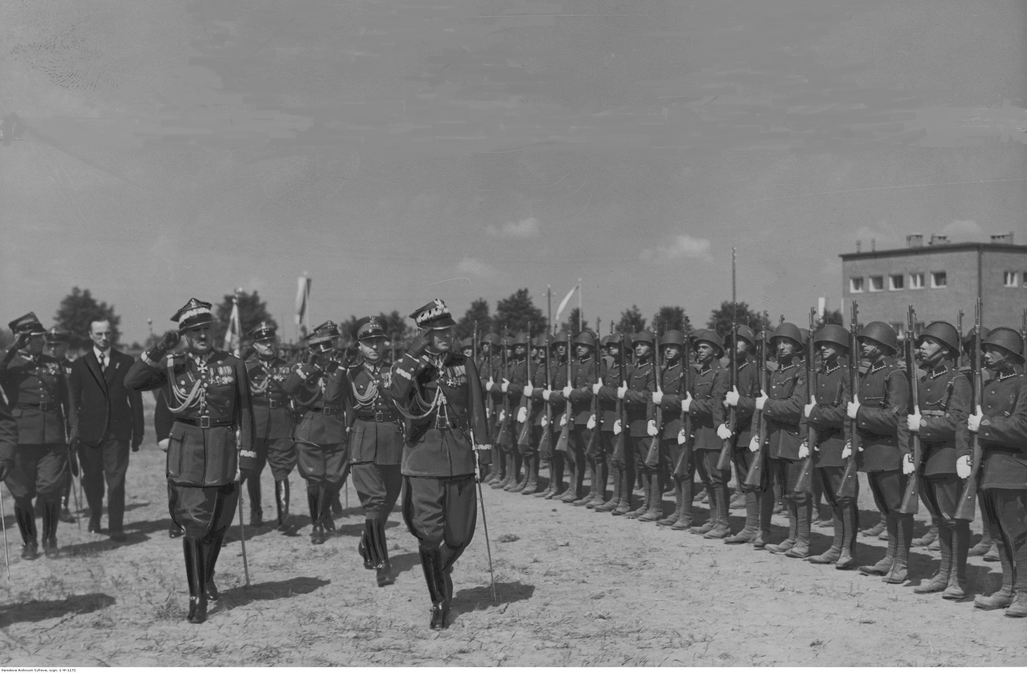 Święto 10 Pułku Piechoty w Łowiczu. Gen. Edward Rydz-Śmigły (idzie pierwszy) w otoczeniu nierozpoznanych oficerów przechodzi przed frontem kompanii honorowej. Zespół: Koncern Ilustrowany Kurier Codzienny - Archiwum Ilustracji. Sygnatura: 1-W-1172